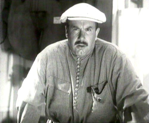 Кадр из фильма «Волга-Волга» (1938)Кадр из фильма «Волга-Волга». Игорь Ильинский.